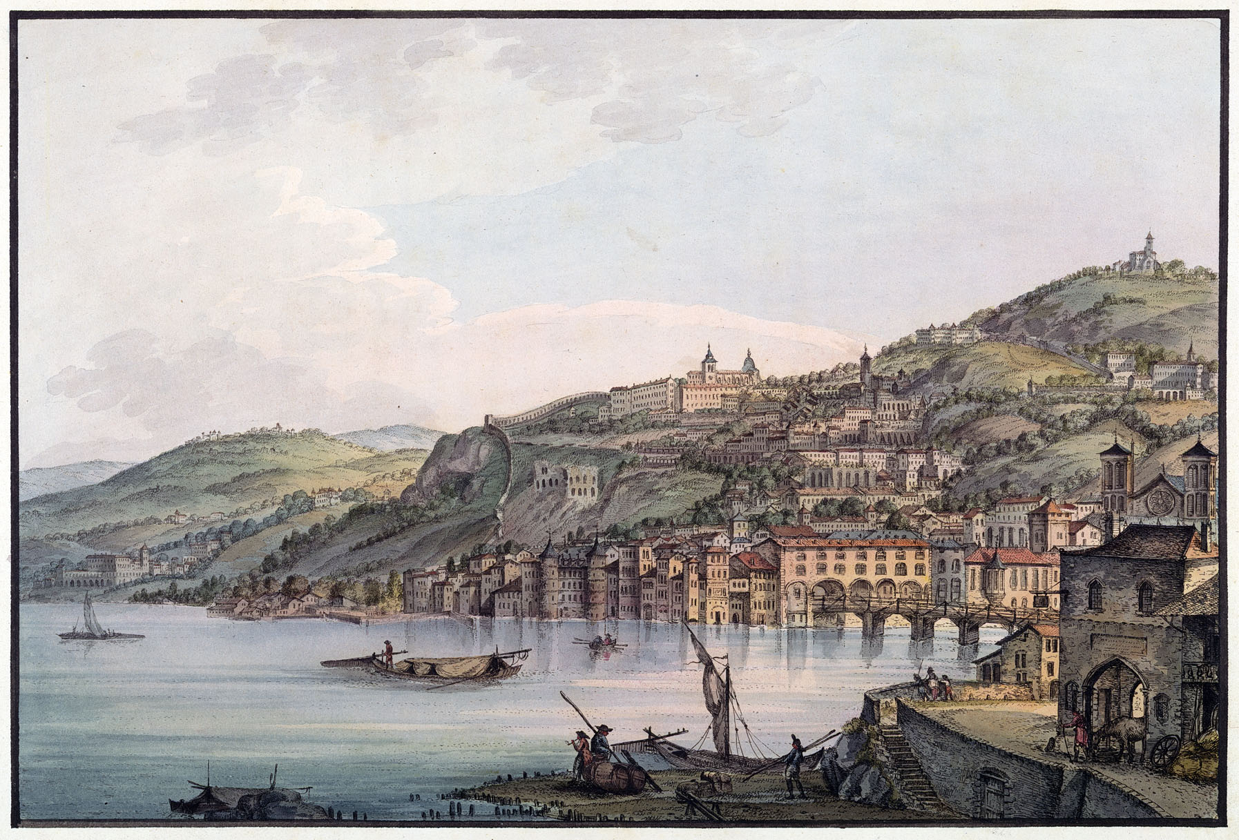 Jean-François Albanis Beaumont, Lyons, in Travels from France to Italy through the Lepontine Alps, 1800, Londres. Vue de Lyon depuis l'ancien arsenal